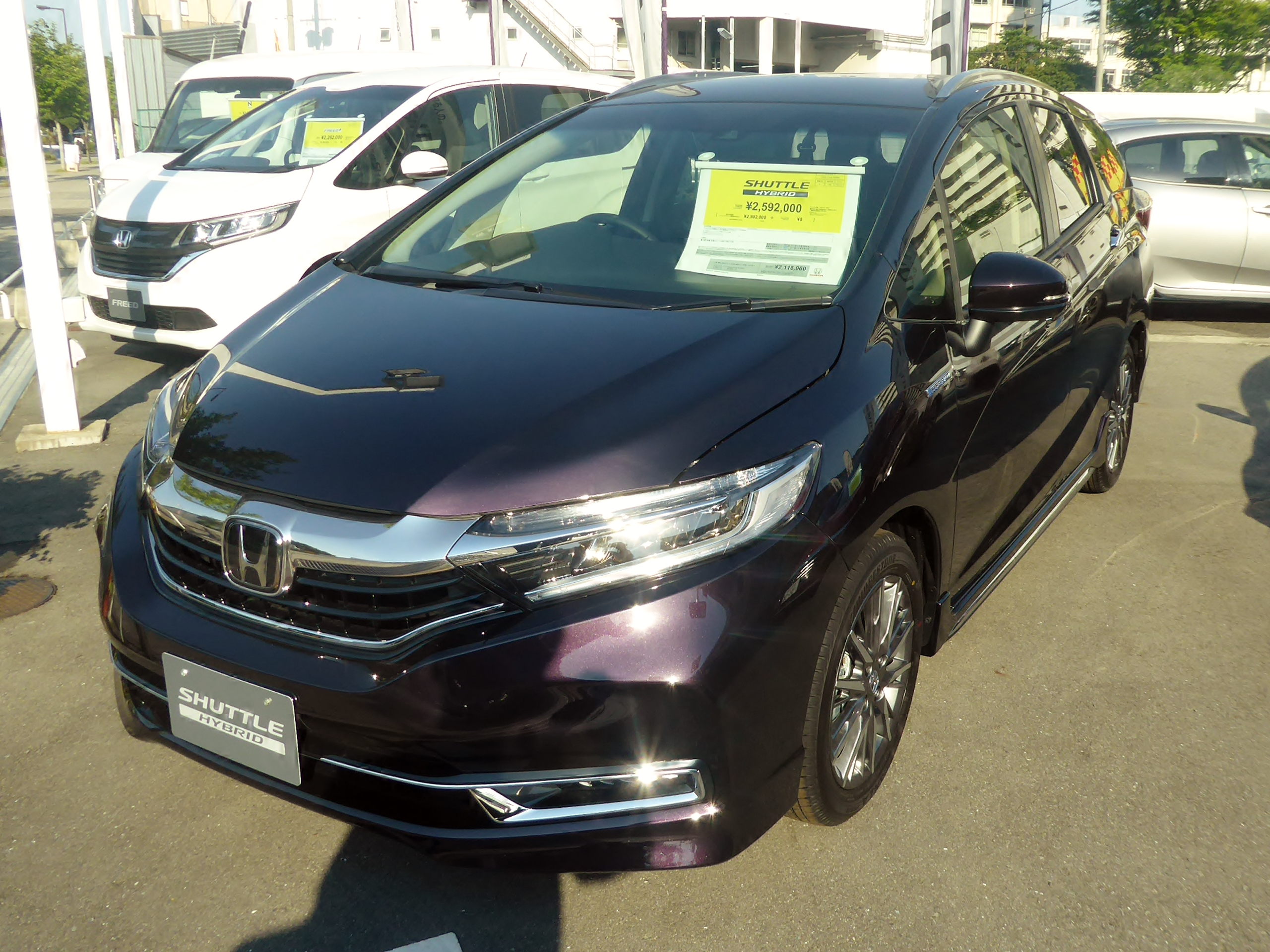 6AA-GP7型ホンダ・シャトルHYBRID Z・Honda SENSINGをフロントから撮影。